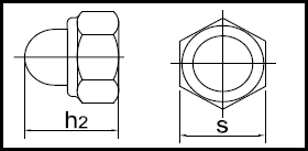 DIN 986